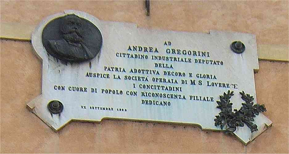 Lovere BG lapide commemorativa di Giovanni Andrea Gregorini (1819-1878) industriale e politico fautore della linea ferroviaria Sarnico-Palazzolo sull'Oglio